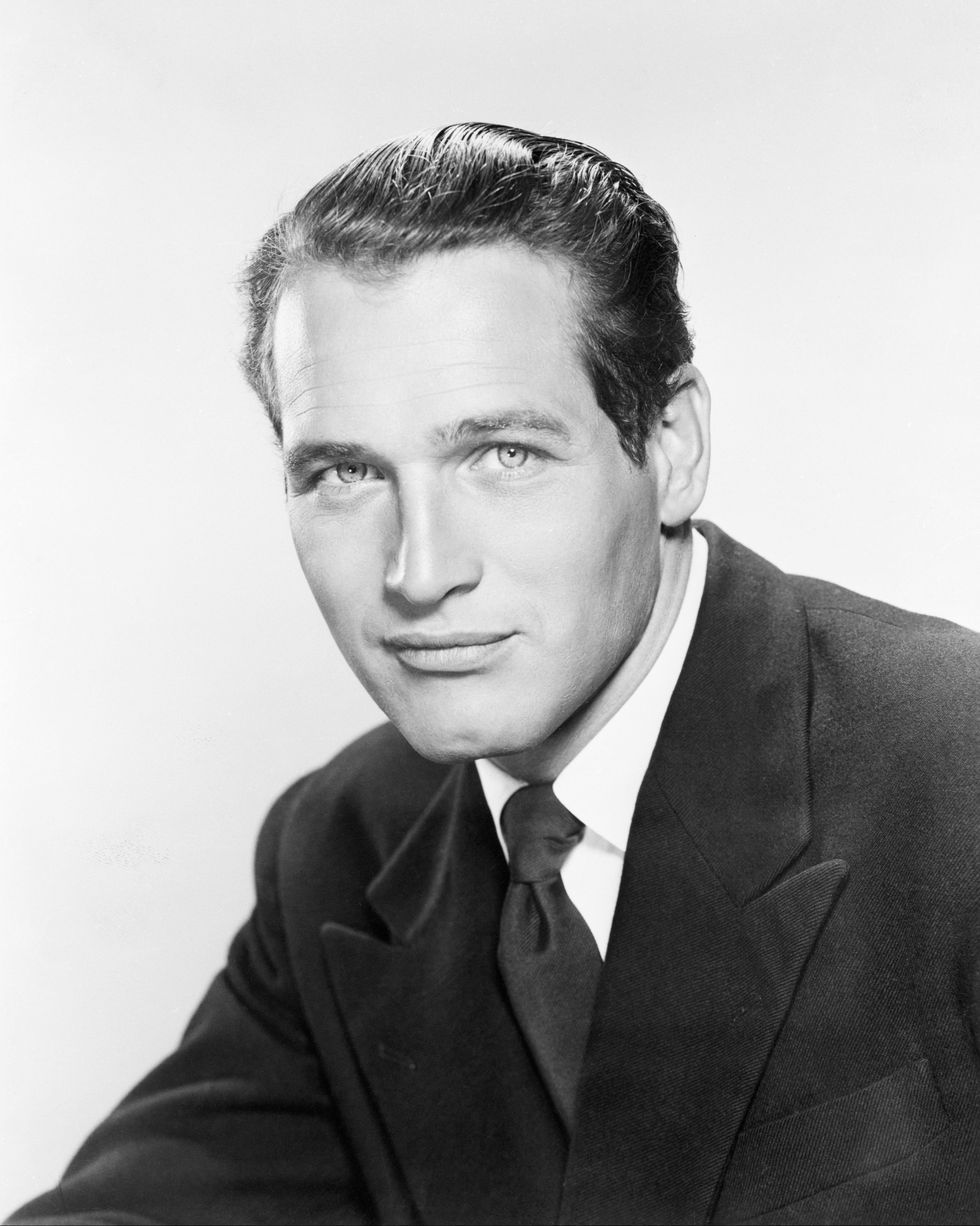 Paul Newman in uno scatto publicitario.